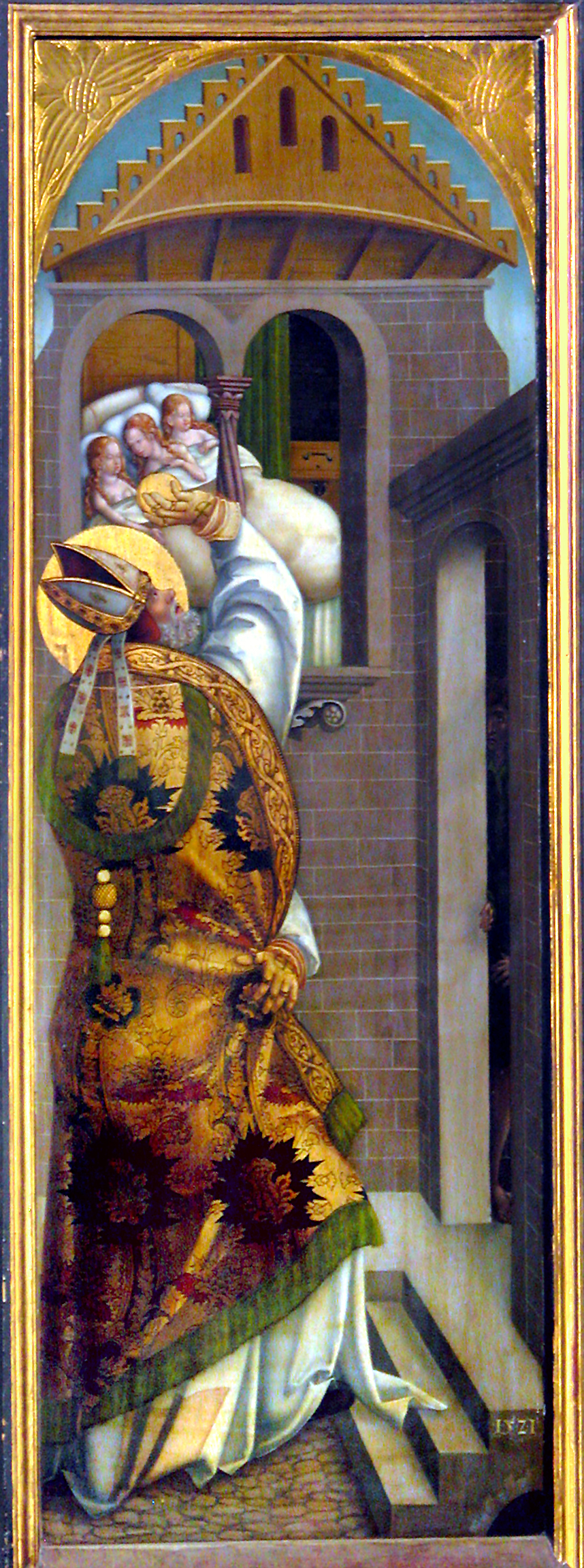 12.09.2011 09627 Oberbobritzsch (Bobritzsch-Hilbersdorf), Kirchstraße (GMP: 50.875369,13.453209): Dorfkirche St. Nicolaus, im Kern mmittelalterlich, 1710 erneuert. 3(6)-flügeliger Schnitzaltar (Nikolausaltar) von 1521 von einem unbek. Freiberger Künstler, dem sog. "Bobritzscher Meister". Ein Flügel links aufgeklappt: Der hl. Nikolaus errettet 3 Jungfrauen vor dem Bordell. [DSCNn2751.TIF]201109122330DR.JPG(c)Blobelt